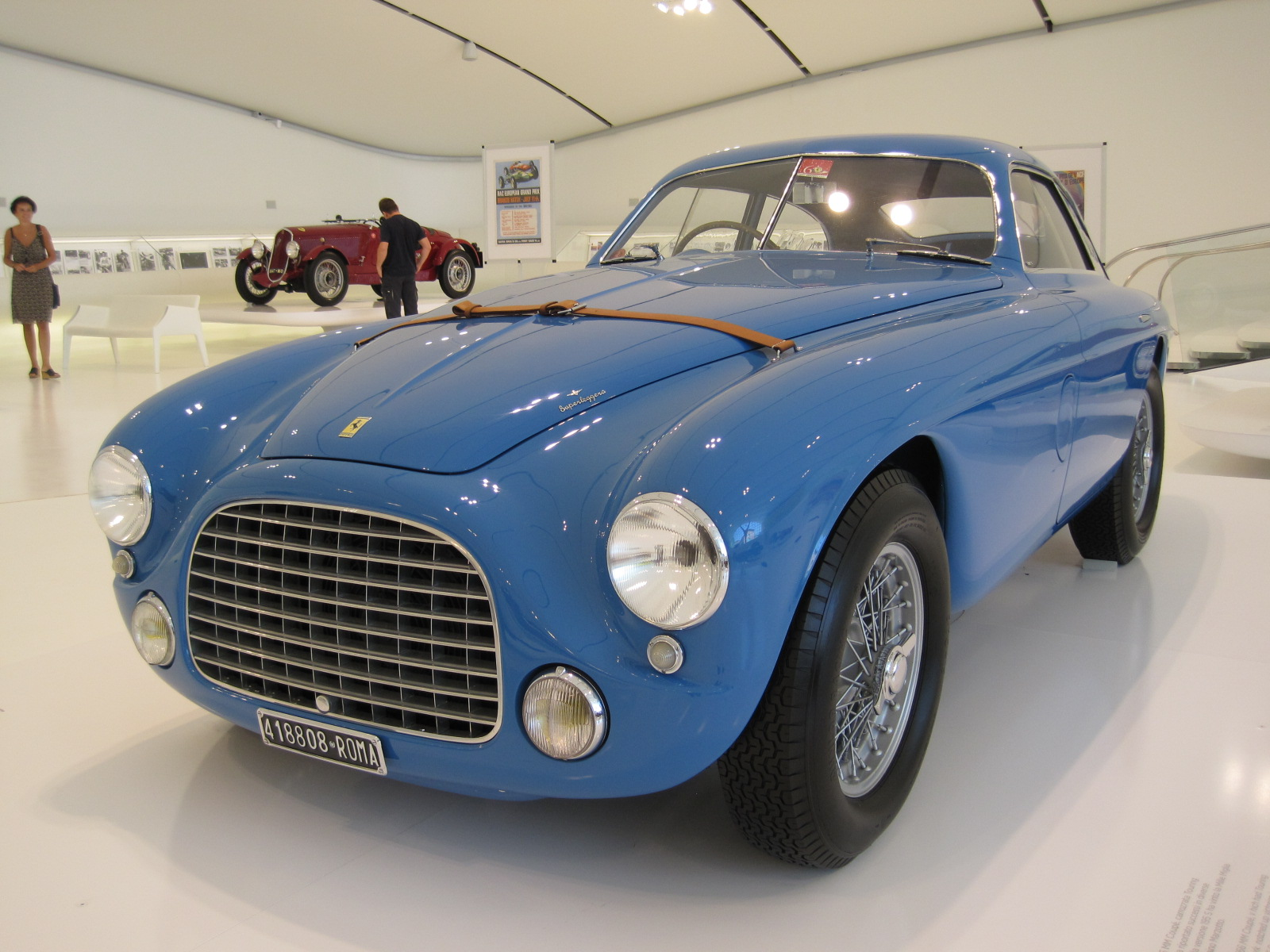 Automobiles in Enzo Ferrari Museum in Modène - Ferrari 166 MM - Coupé Touring V12 - 1949